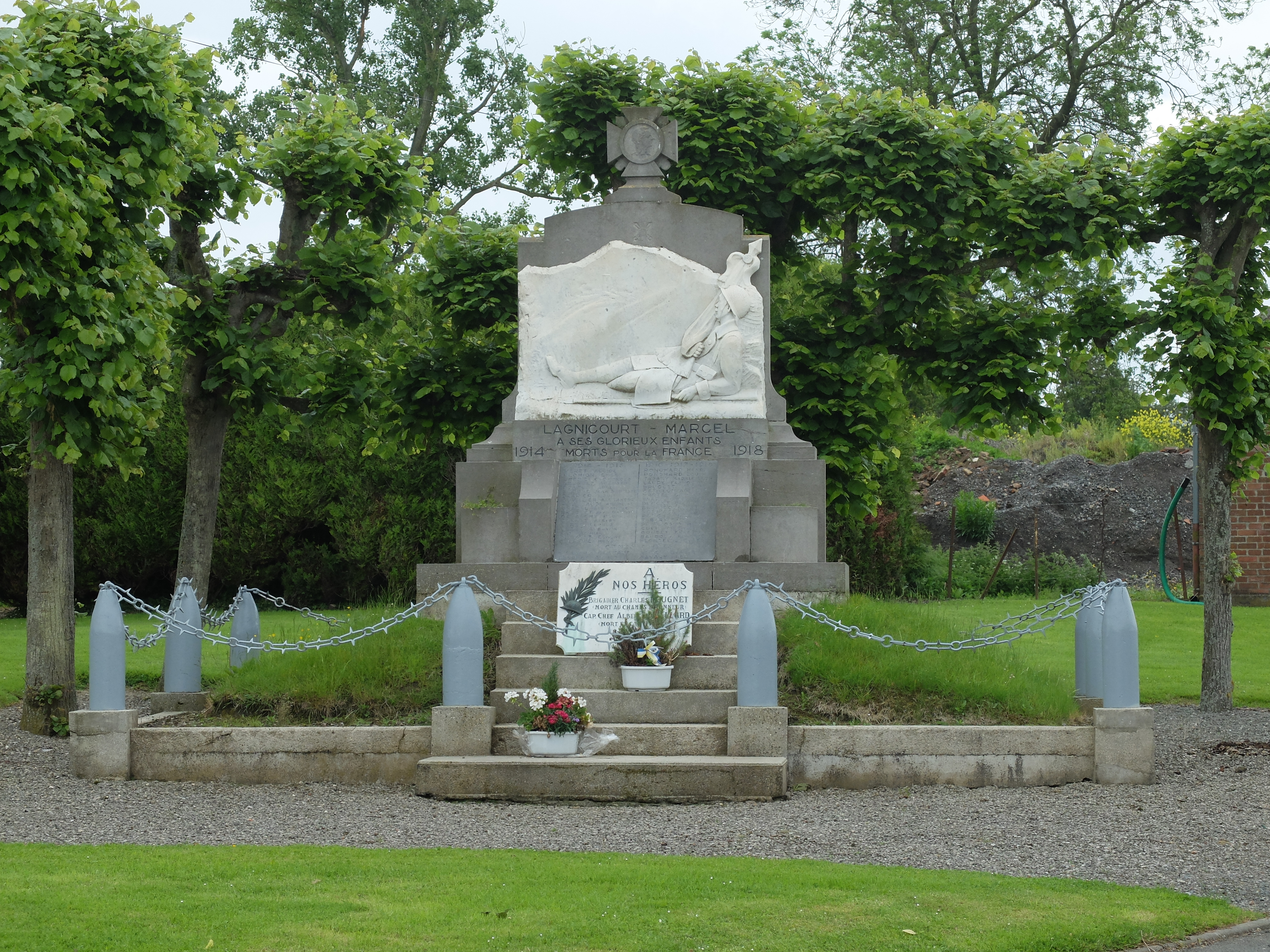 Vue du monument aux morts de Lagnicourt-Marcel.